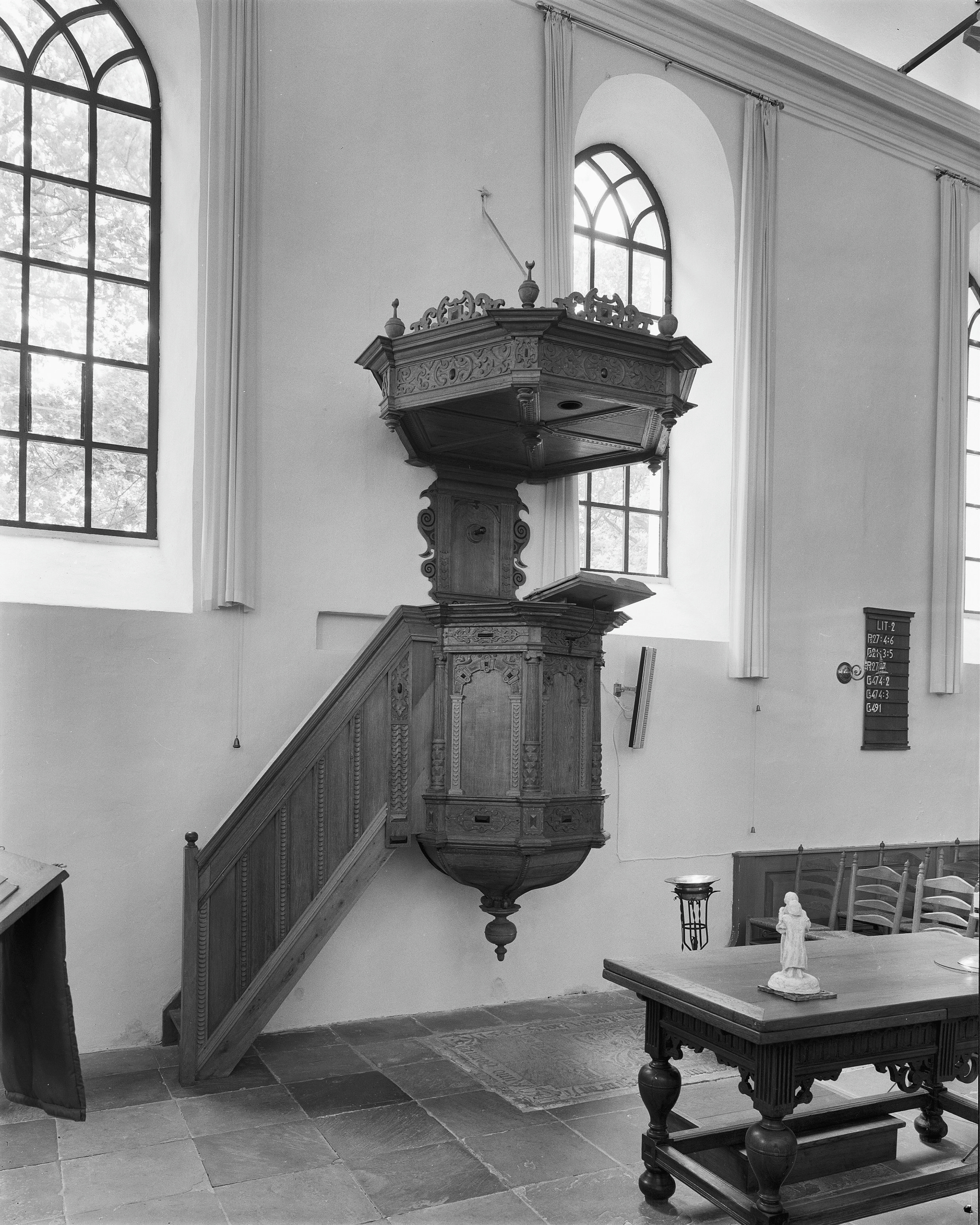 Nederlands Hervormde Kerk: INTERIEUR, PREEKSTOEL